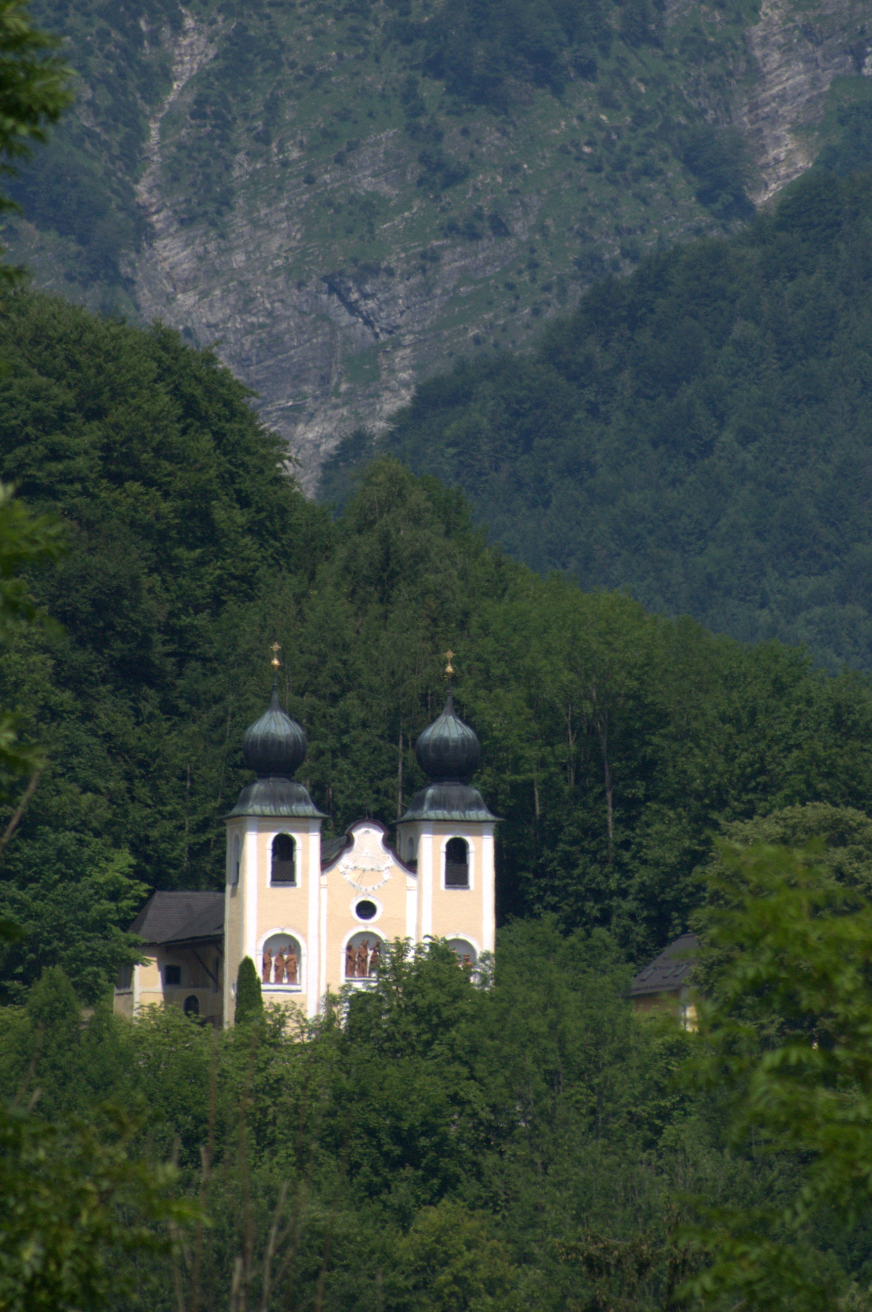 Kalvarienbergkirche